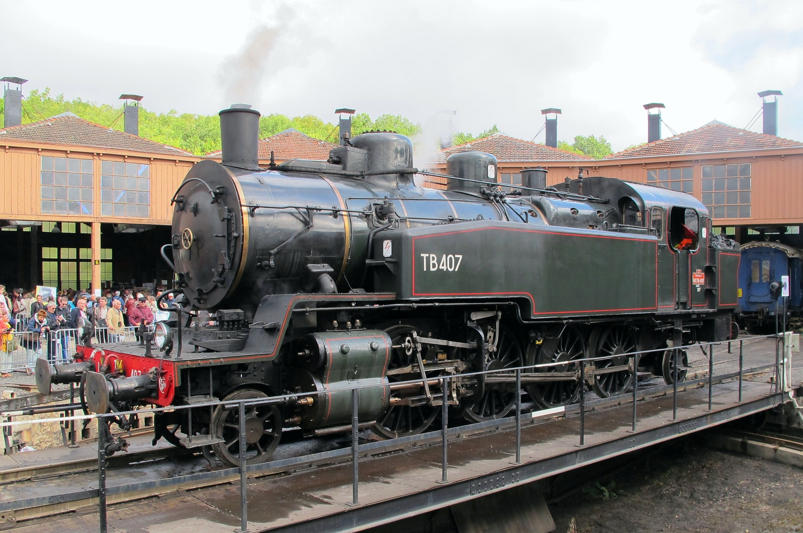 La 141 TB 407 au dépôt de Longueville le 18 septembre 2011.